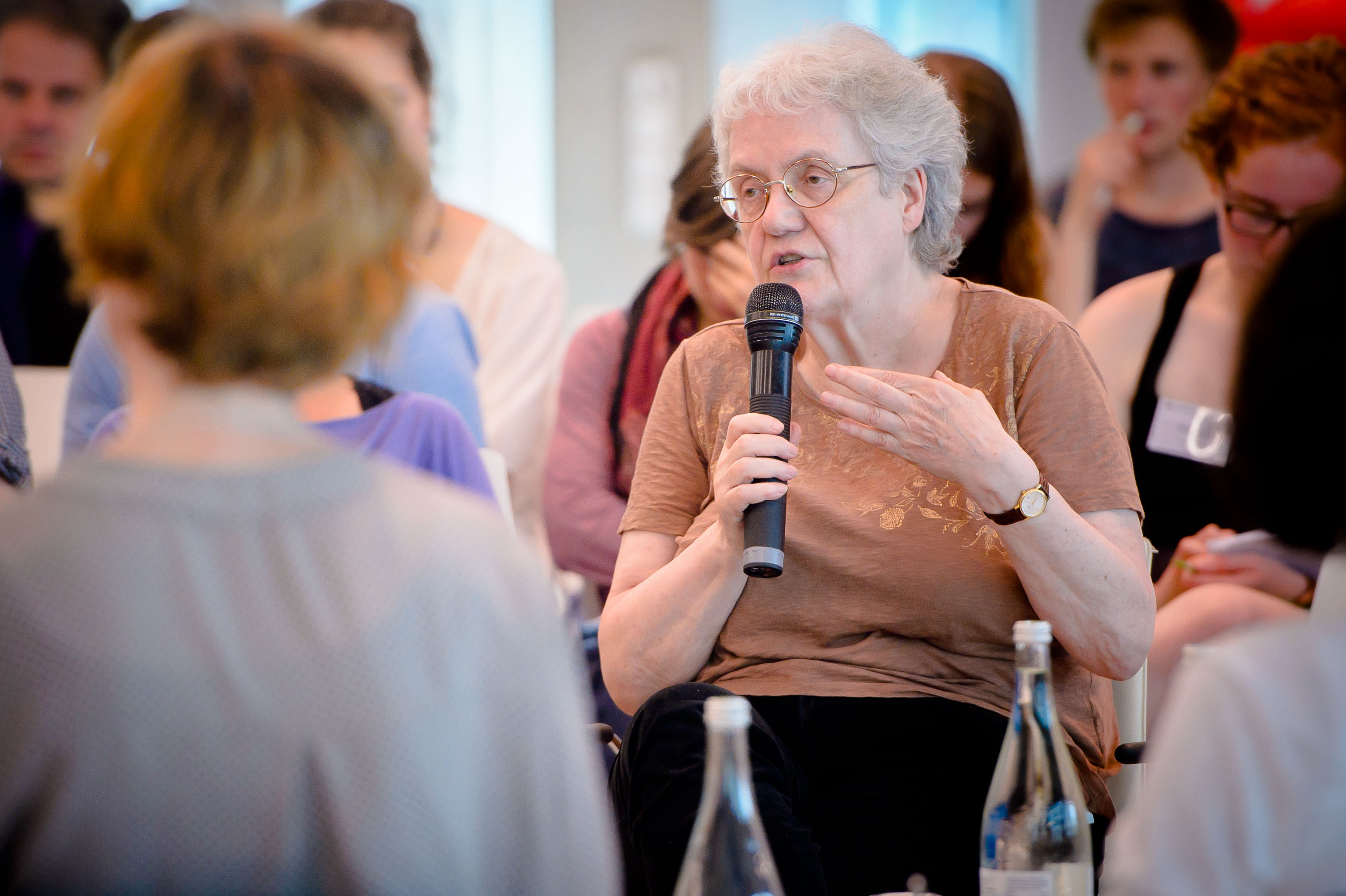 Prof. emer. Dr. Ilse Lenz (Ruhr-Universität Bochum) Foto